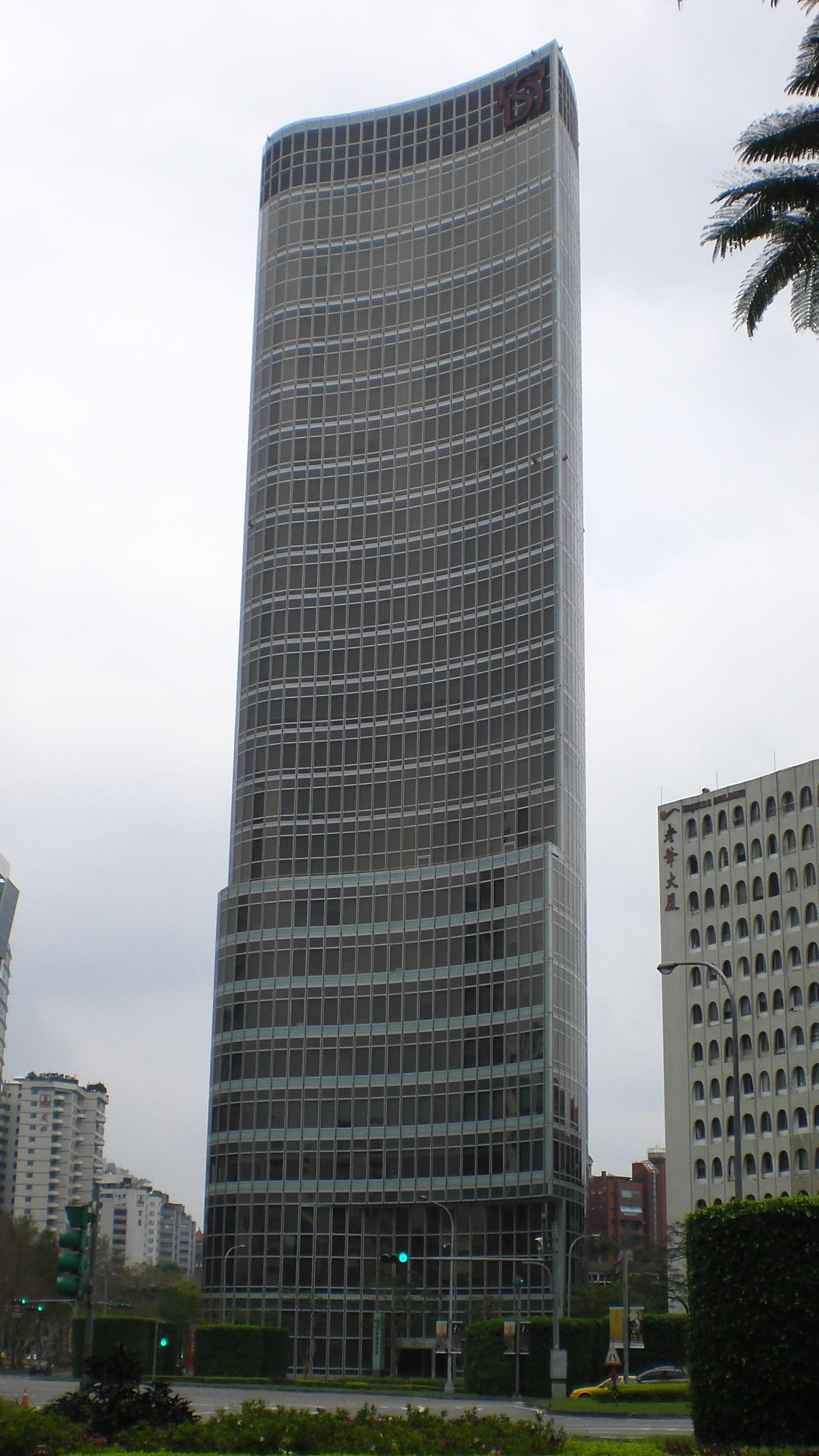 台新金控大樓，地址：臺北市大安區仁愛路四段118號。